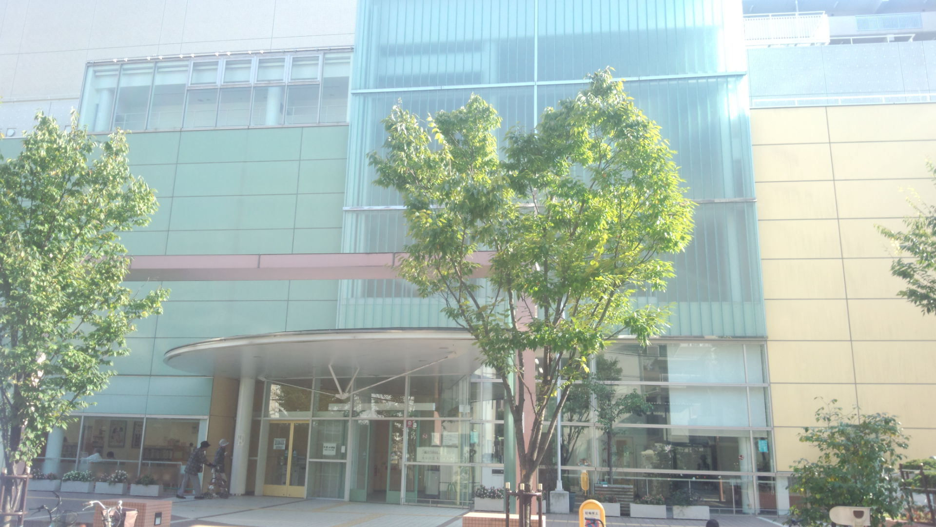 大阪市鶴見区の市立図書館